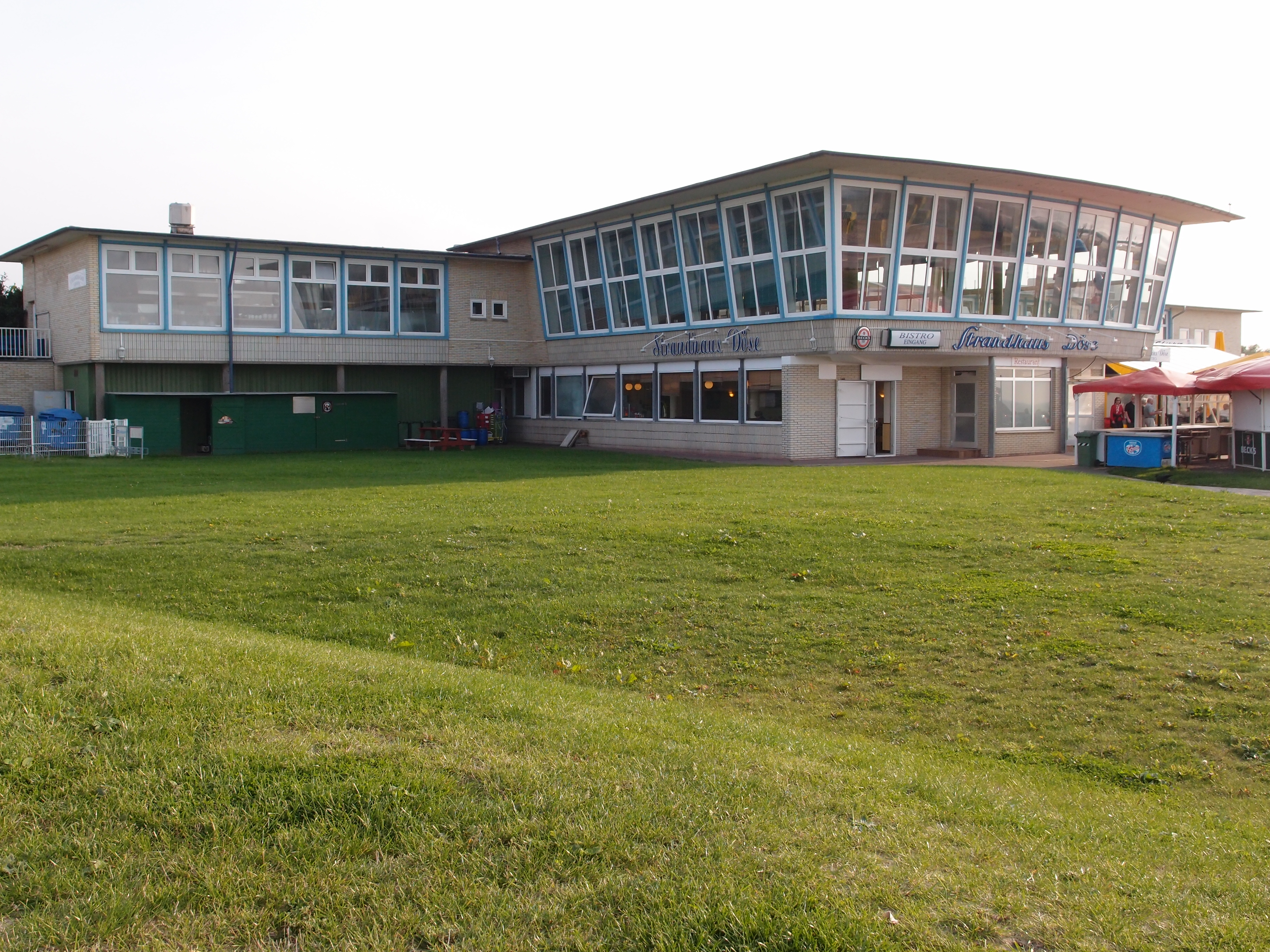 Cuxhaven Steinmarner Seedeich - Döser Strandhaus Ansicht von Nordosten